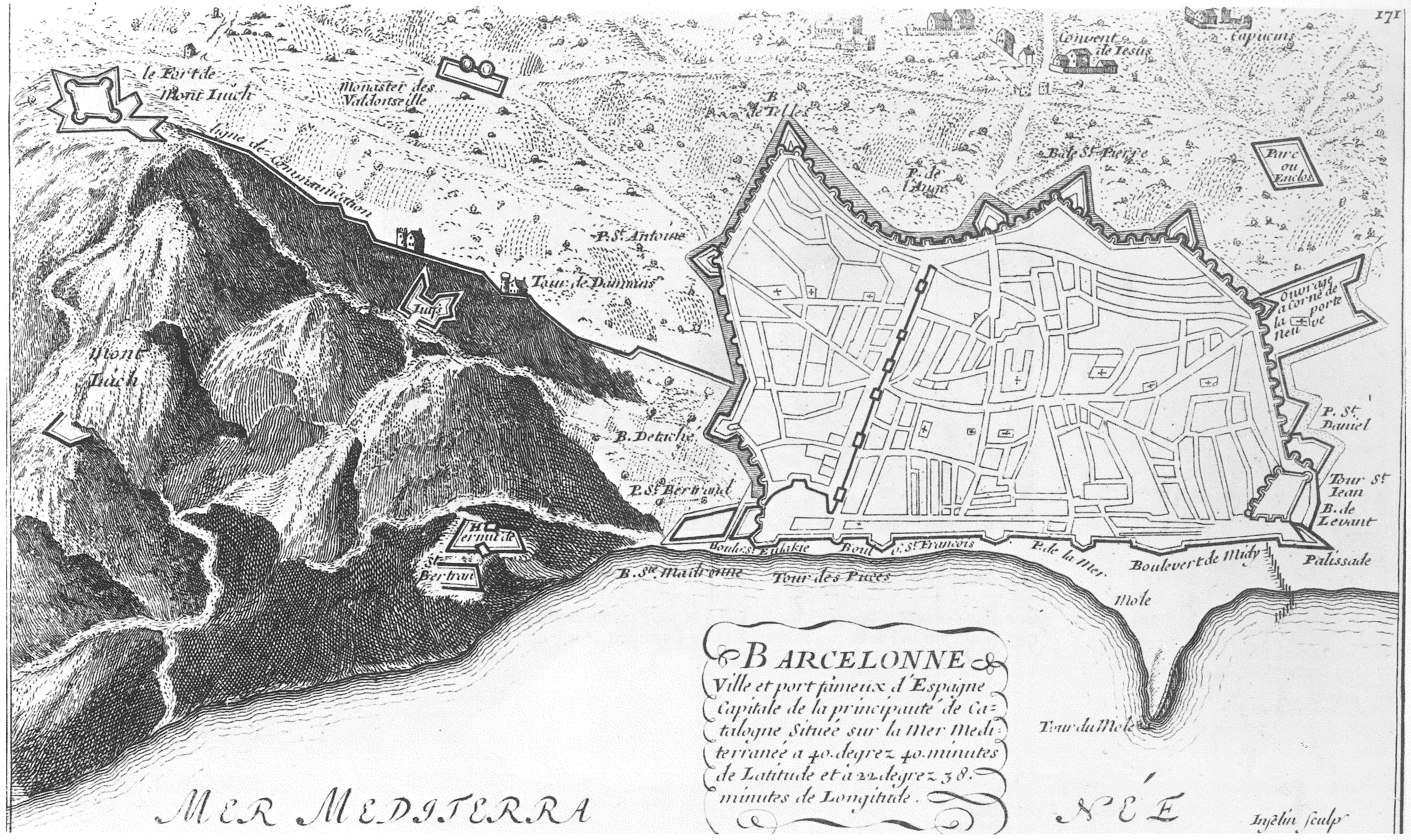 Barcelone, ville et por fameux d'Espagne. Capitale de la Principauté de Catalogne. Autor N. de Fer (1646-1720). Mapa dibuixat amb finalitat militar